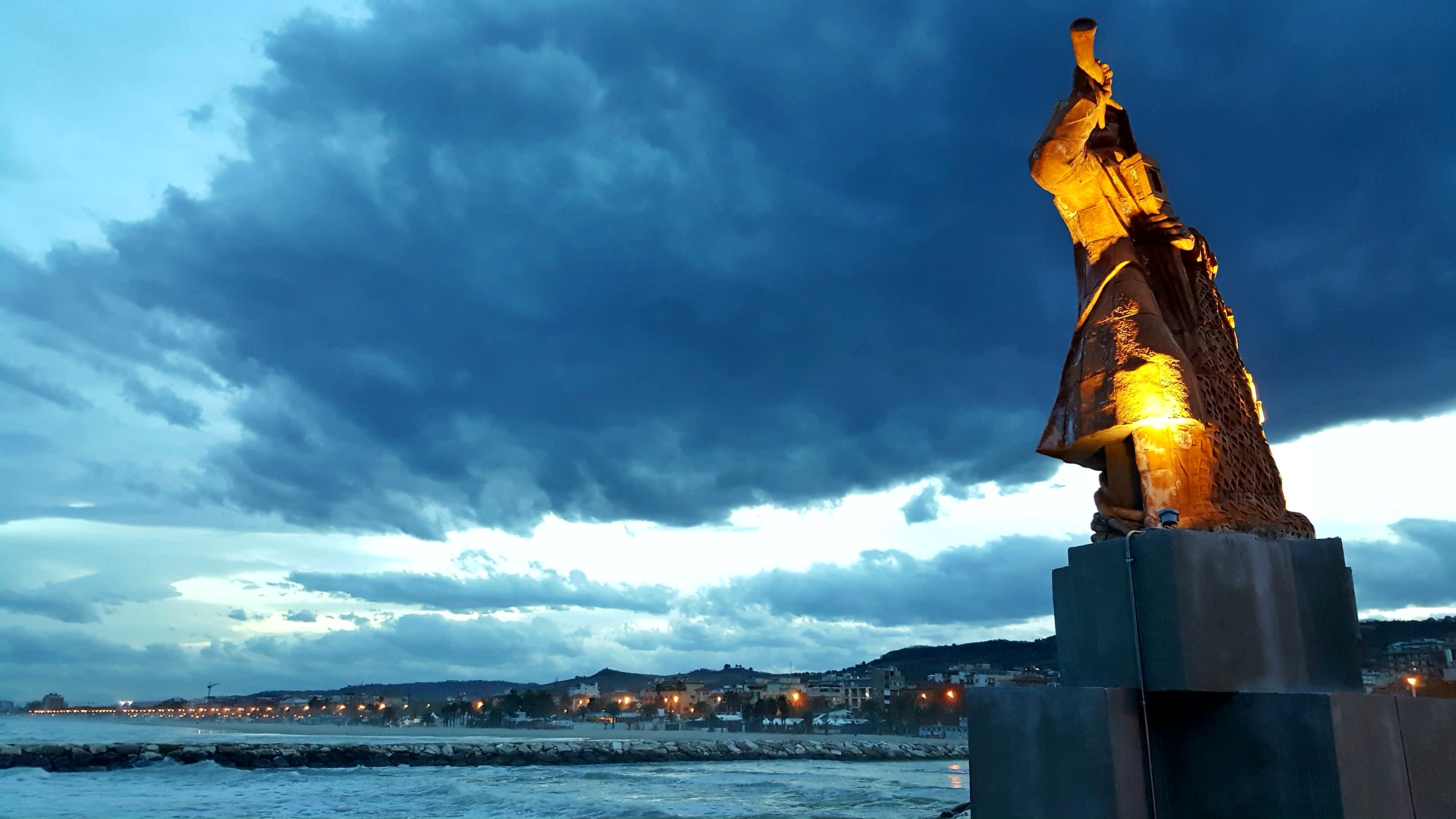 Monumento al pescatore in un tramonto autunnale